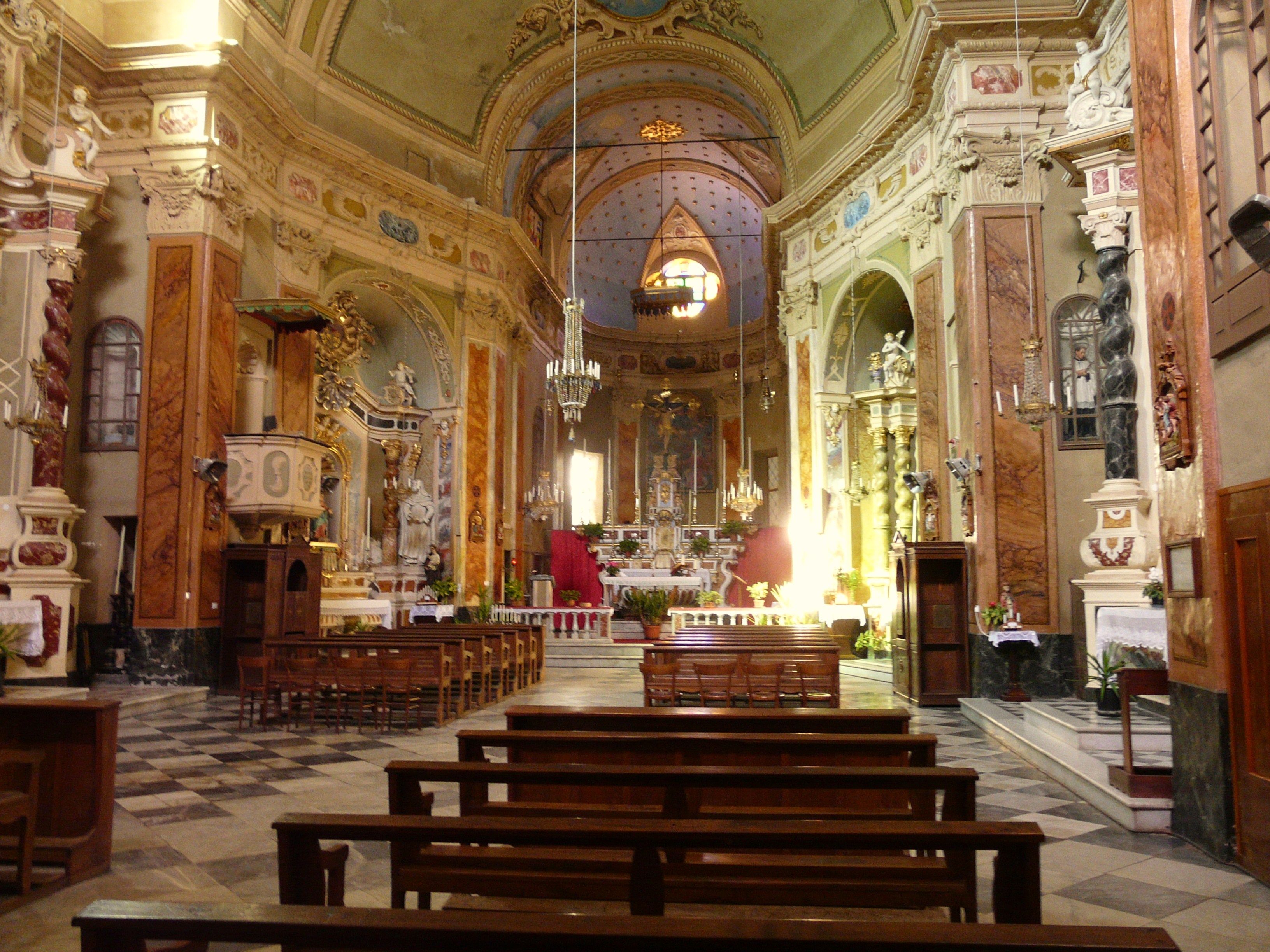 Chiesa di Sant'Antonino, Carpasio, Liguria, Italia